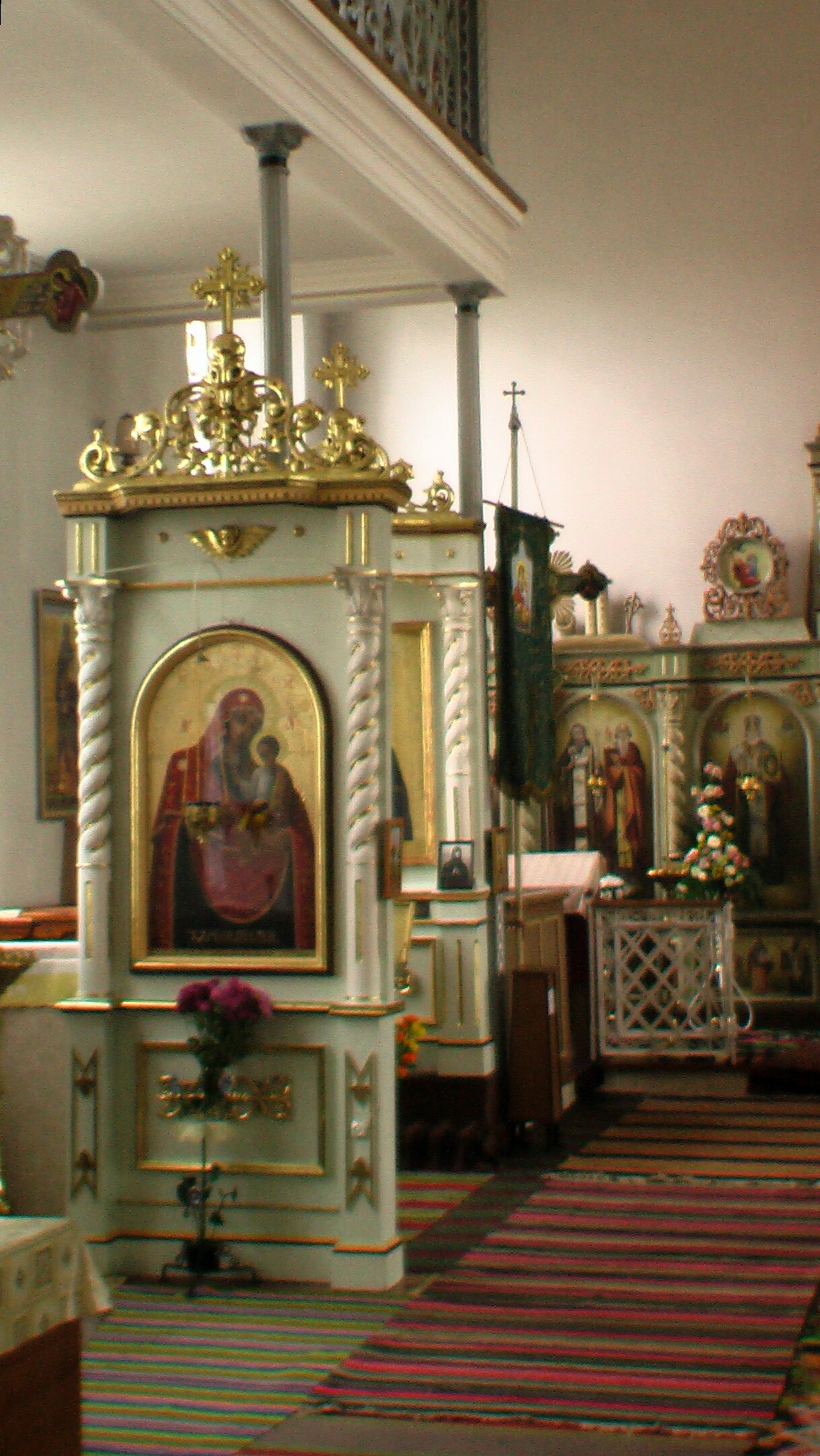 MoldawienKlosterRaciula2